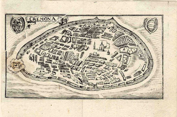 Cremona (Stadtplan aus der Vogelschau); Radierung, um 1570